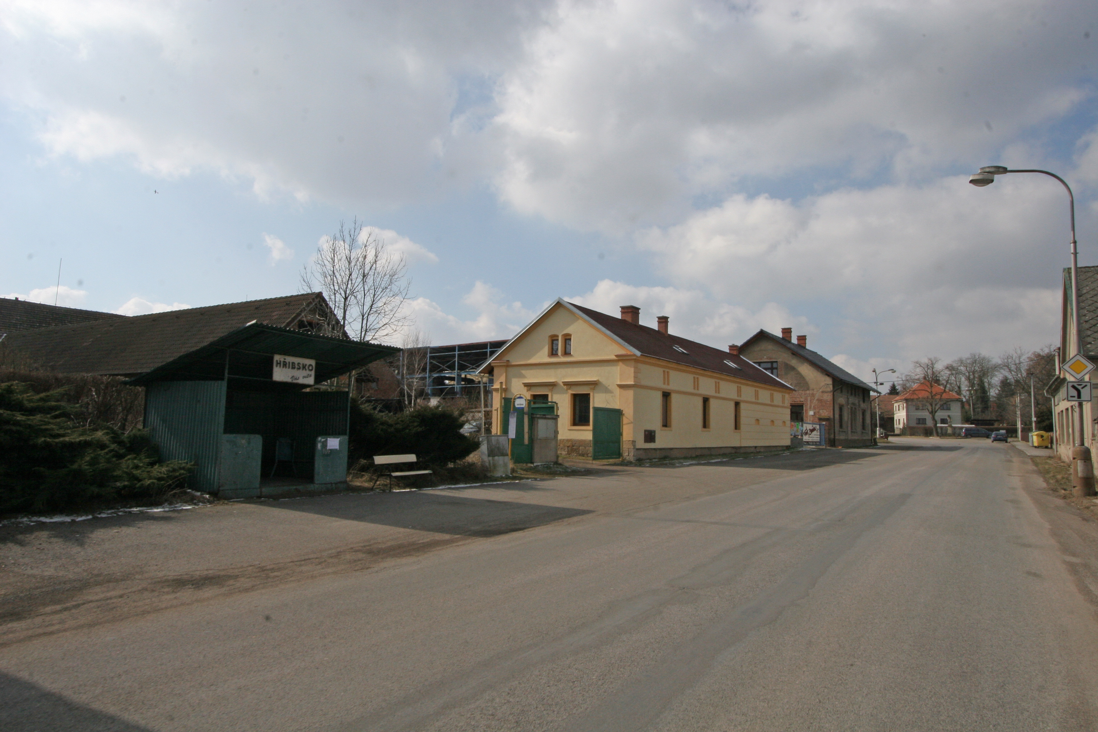 Hřibsko čp. 29